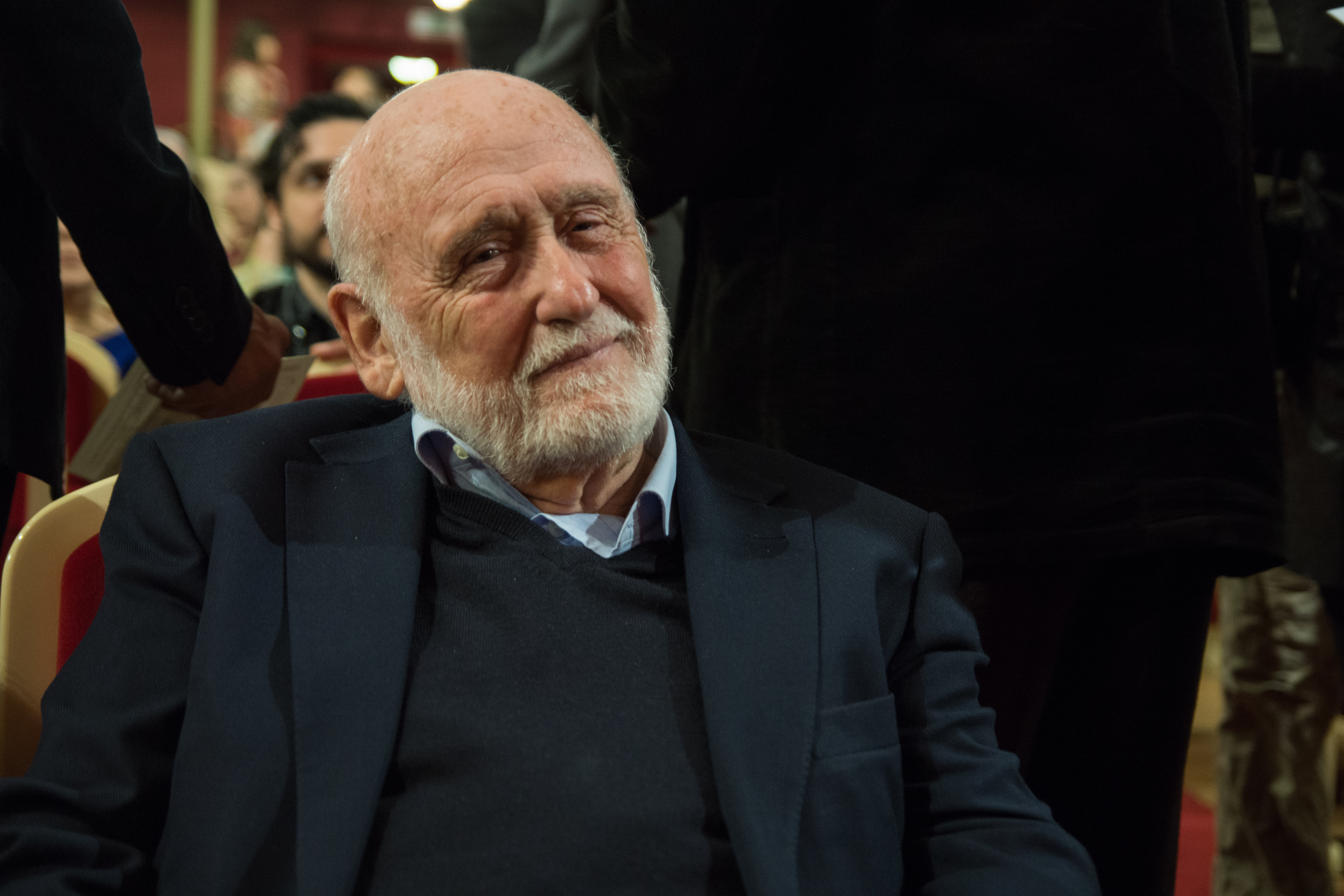 El actor Fernando Chinarro durante la Clausura del Festival de Cine IBAFF de Murcia de 2013